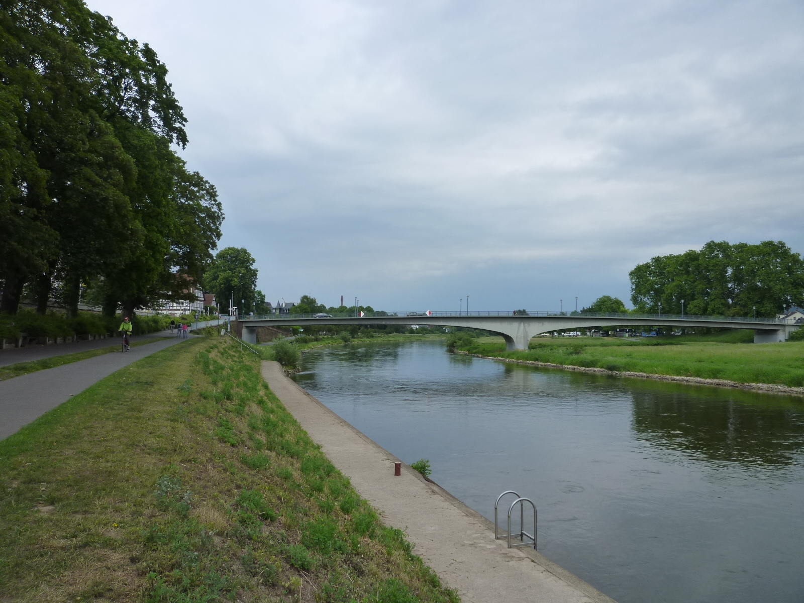 Der Weser-Radweg bei der Stadt Höxter